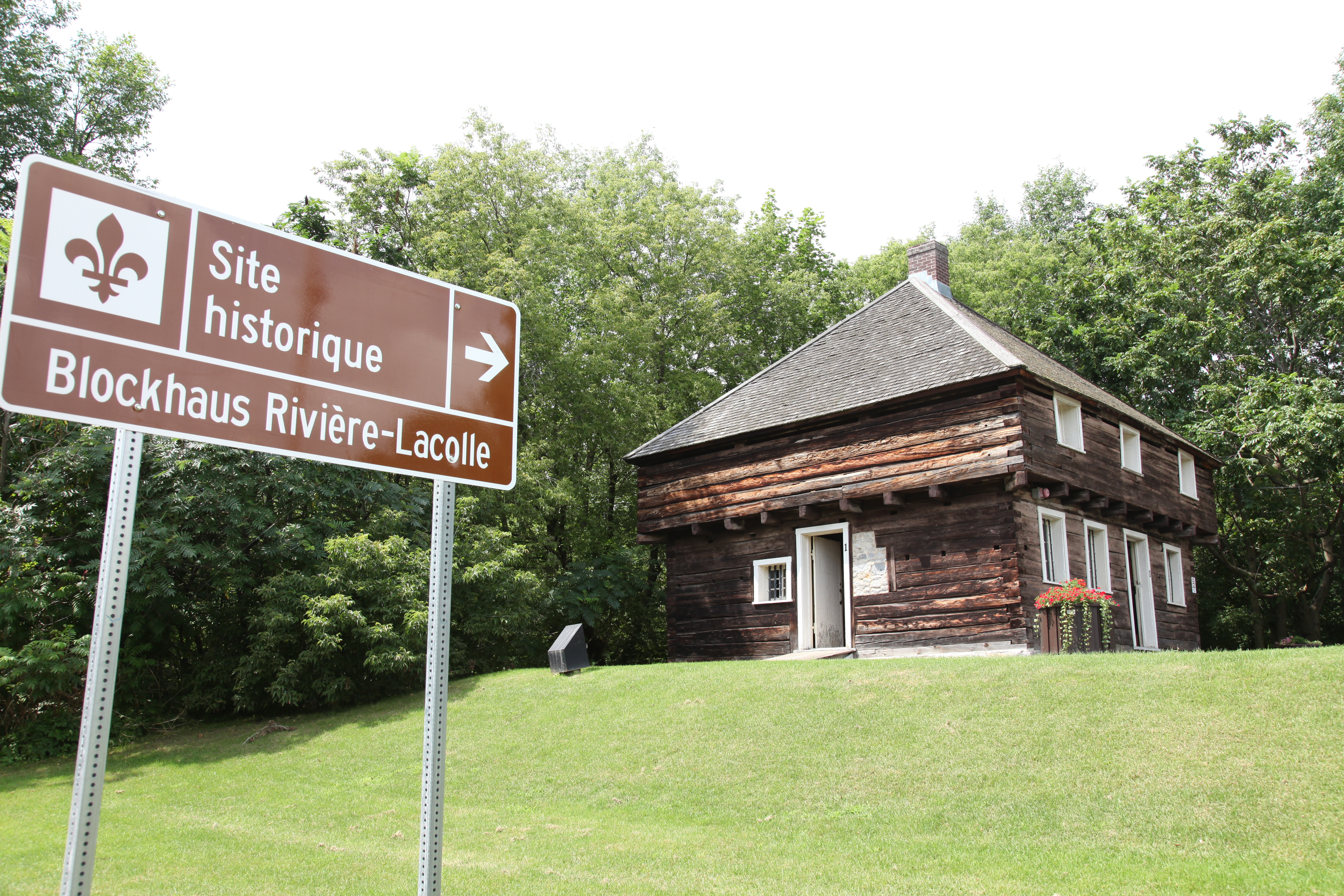 Le blockhaus de la Rivière-Lacolle, classé en 1960, est un ouvrage militaire, érigé à une date indéterminée entre 1778 et 1812. L'édifice en bois de plan carré à deux étages, dont l'étage supérieur est en encorbellement, est coiffé d'un toit en pavillon. La désignation s'applique aussi au terrain. Le blockhaus de la Rivière-Lacolle se situe sur un vaste terrain paysager surplombant la rivière Lacolle, dans la municipalité de Saint-Paul-de-l'Île-aux-Noix. La valeur patrimoniale du blockhaus repose sur son intérêt pour l'architecture militaire. Il est un petit ouvrage défensif qui sert notamment d'avant-poste à un fort, de point de contrôle pour un accès stratégique, de halte et d'abri des détachements en mouvement, d'entrepôt de vivres et de munitions ainsi que de caserne pour de petites garnisons. Il est bâti sur le modèle des fortins, à partir de matériaux locaux comme bois et pierre, et requiert peu de connaissances en matière de construction. Le blockhaus de la Rivière-Lacolle est représentatif de ce type d'ouvrage. La valeur patrimoniale du blockhaus de la Rivière-Lacolle repose également sur sa rareté. Après la signature du traité de Gand par les Britanniques et les Américains en 1814, les ouvrages militaires sont progressivement abandonnés, affectés à d'autres fonctions ou détruits. Parmi les 25 blockhaus construits au Québec, celui de la Rivière-Lacolle est le seul qui subsistent jusqu'à nos jours.